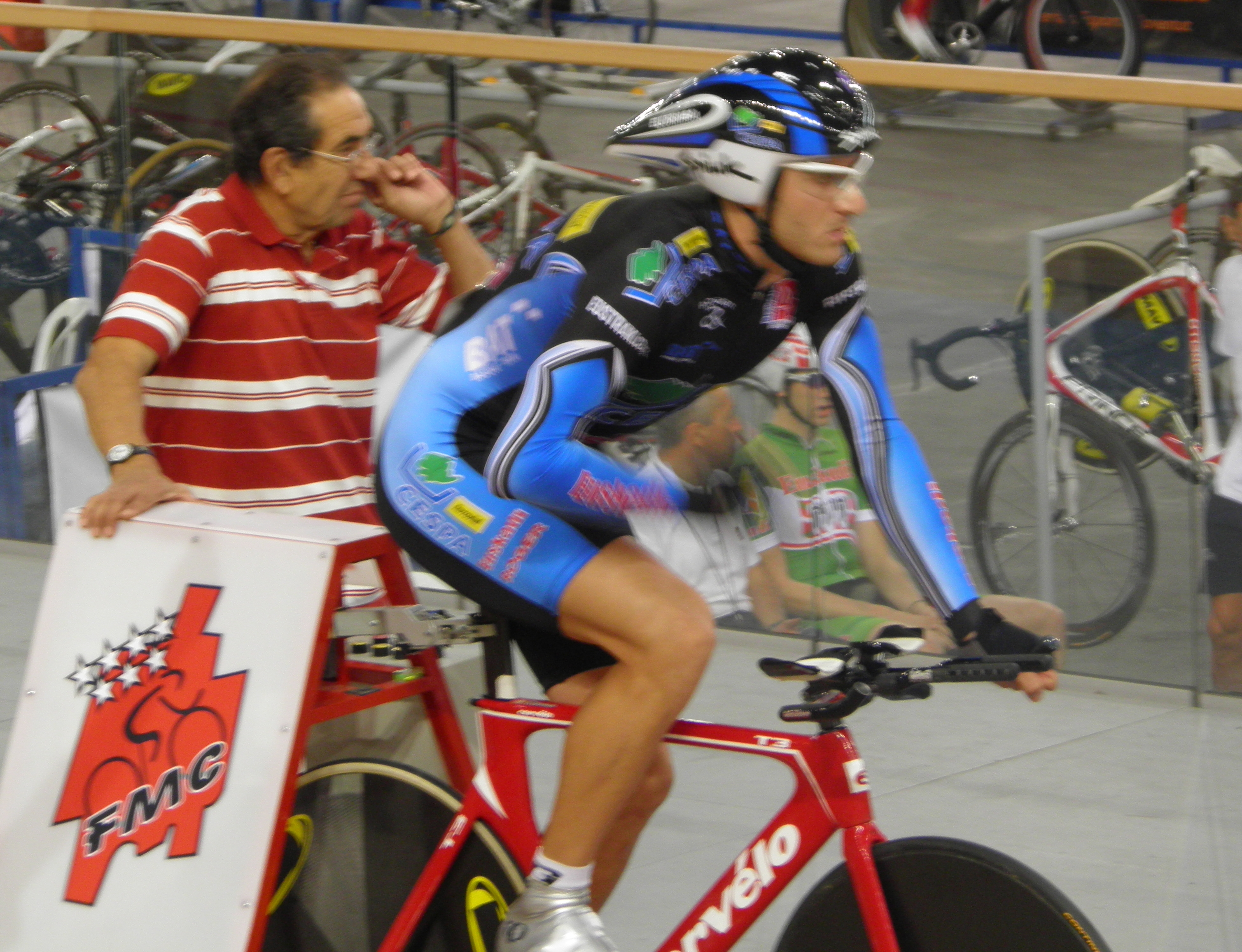 Unai Elorriaga Pistako Espainiako txapelketetan Mallorcan 2010 ean